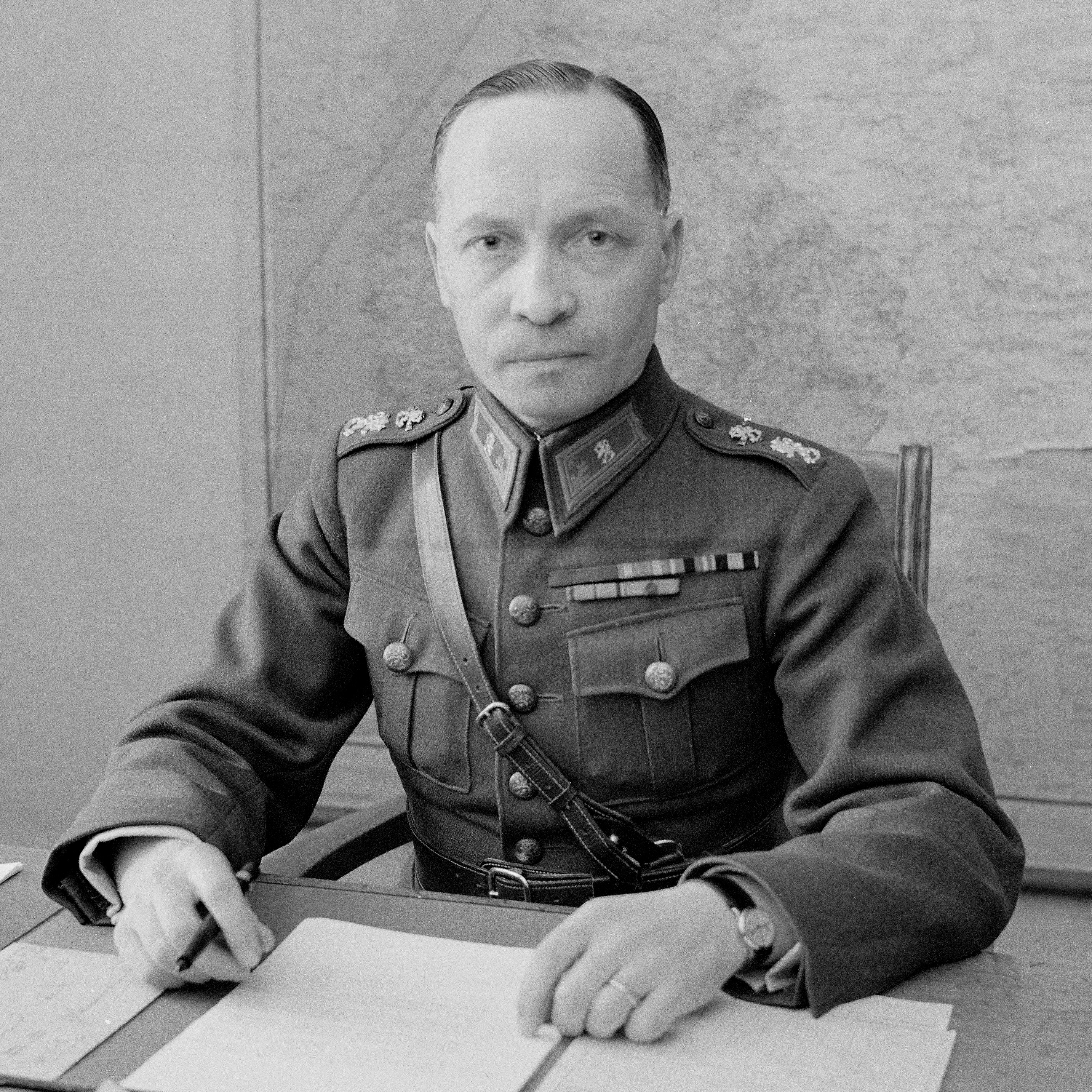 Kenraalimajuri Airo